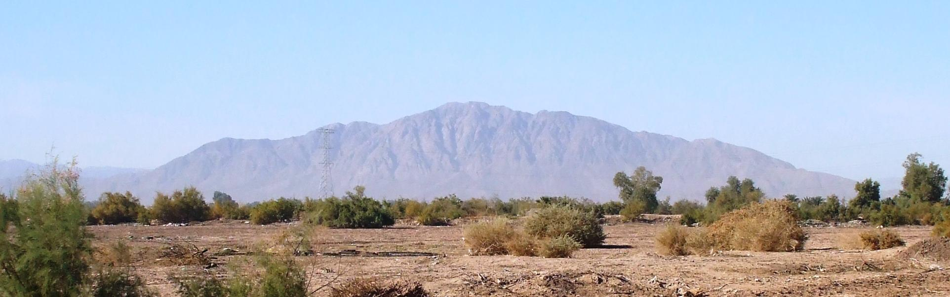 La foto es del cerro: El Centinela. Fue tomada desde la Col Santa Lorena, que es parte integrante de la localidad llamada Santa Isabel, en la delegación Progreso al oeste de la ciudad de Mexicali. A campo traviesa el cerro debe encontrarse a 10 km. del lugar donde fue tomada la foto.